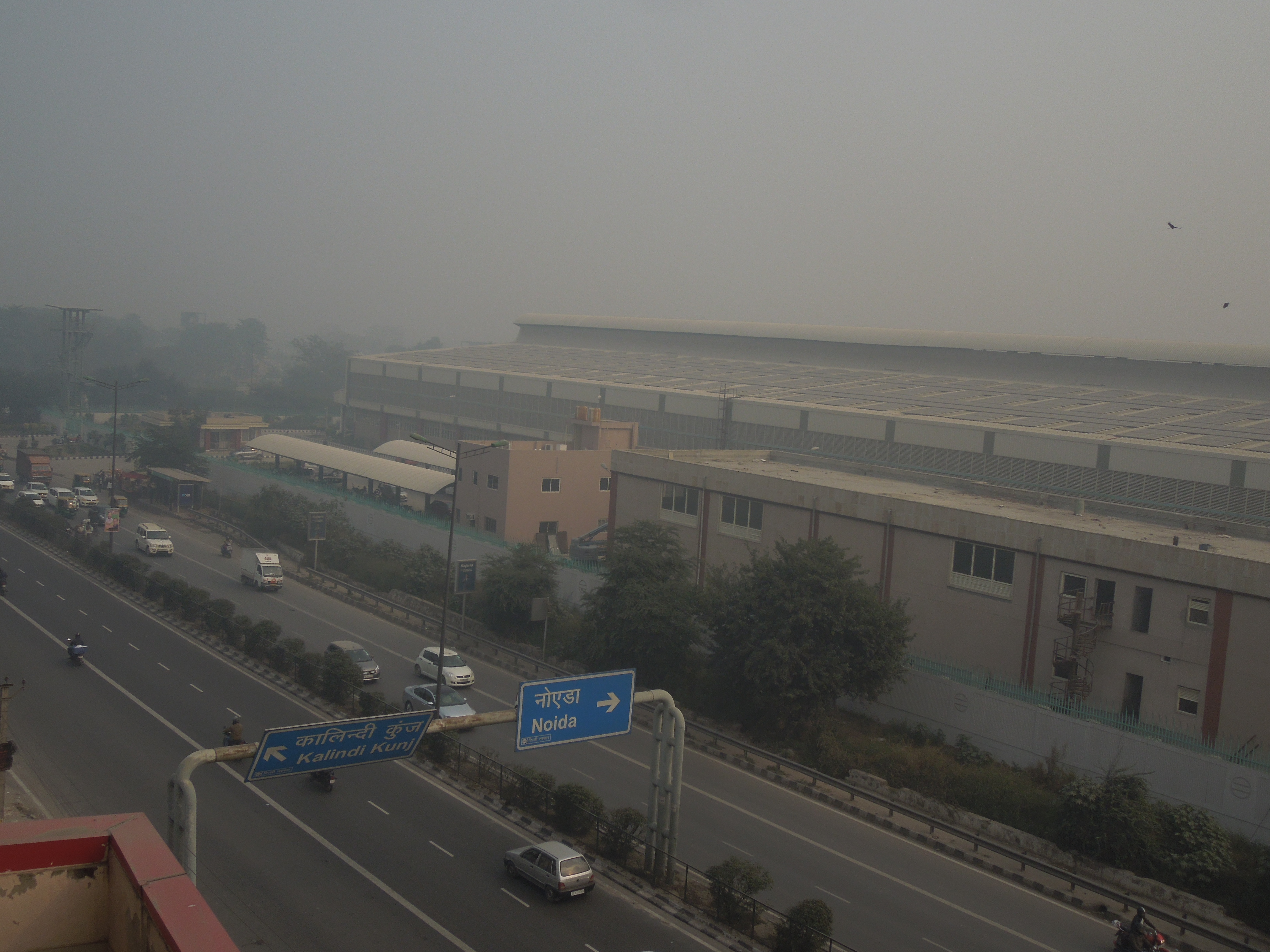 കാളിന്ദി കുഞ്ച് നോയ്ഡ റോഡ്